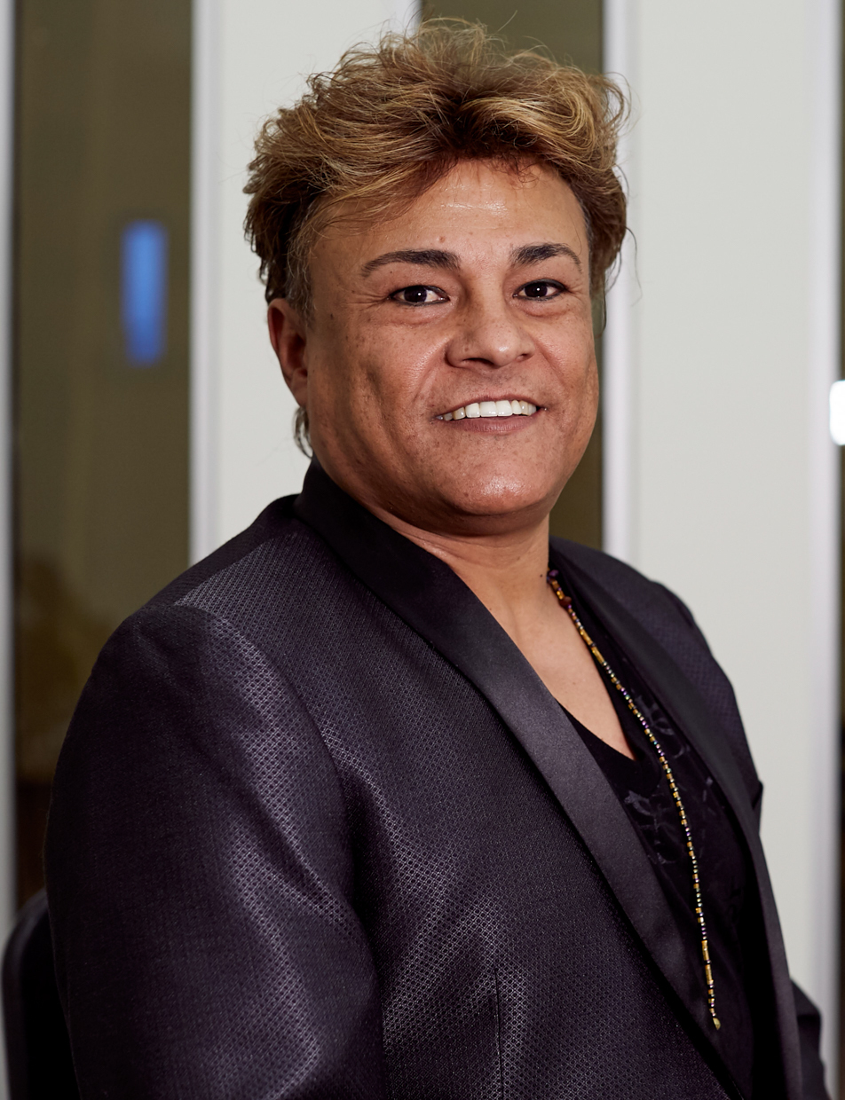 Cassandro el exótico en 2019.